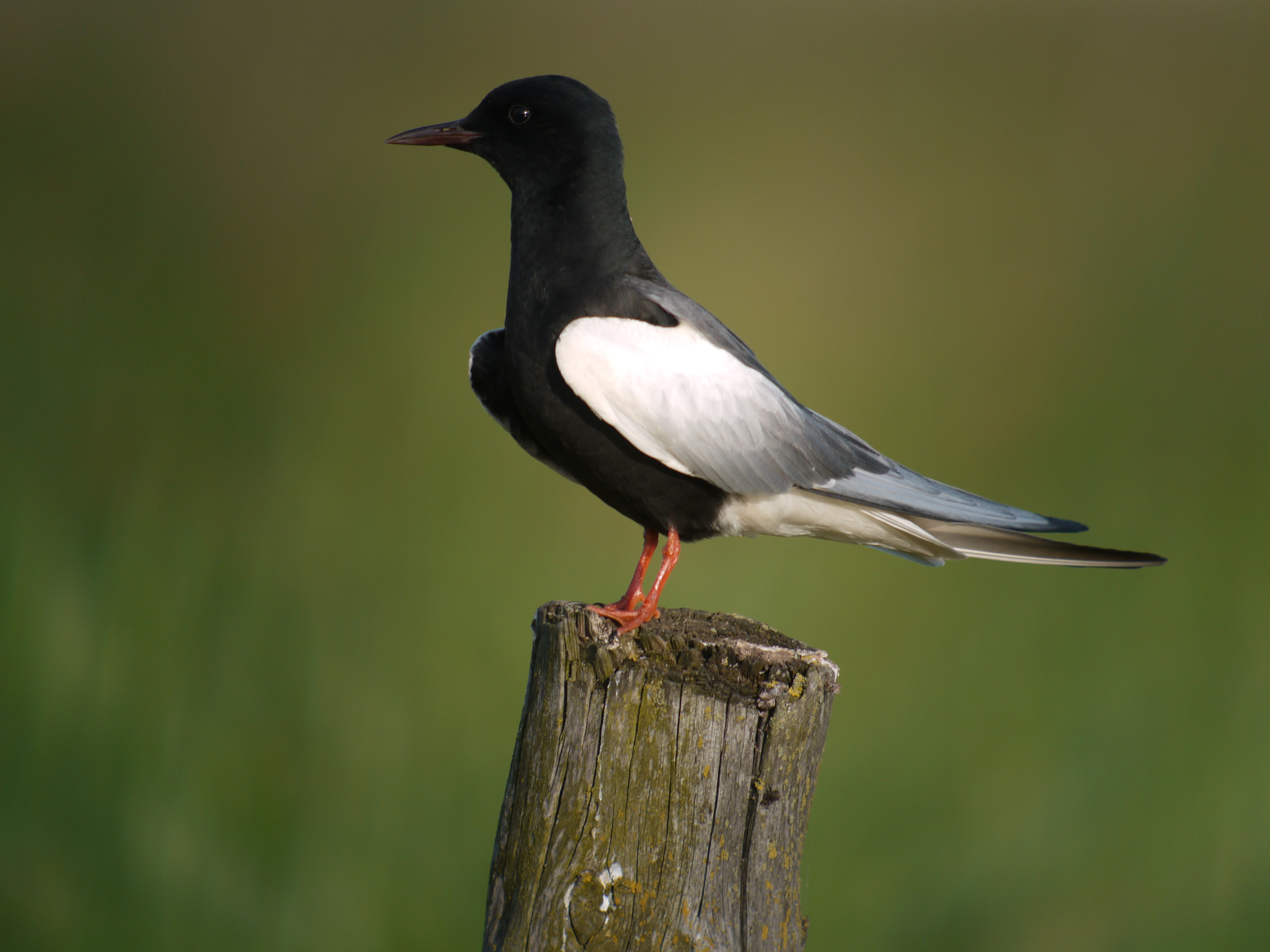 Chlidonias leucopterus, Mścichy, Biebrzański Park Narodowy, Polska. Camera: Swarowski 80 HD 30 X, Panasonic DMC-GF1 + Lumix G 20mm F1.7 ASPH (Adapter DCB)